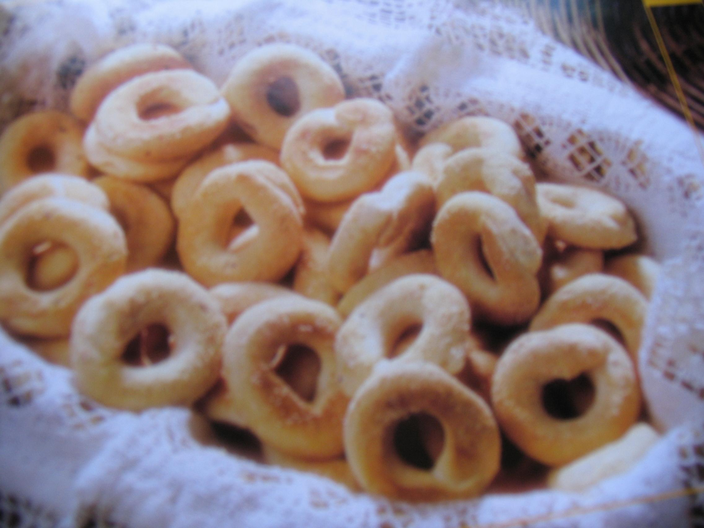 Chipa Pirú